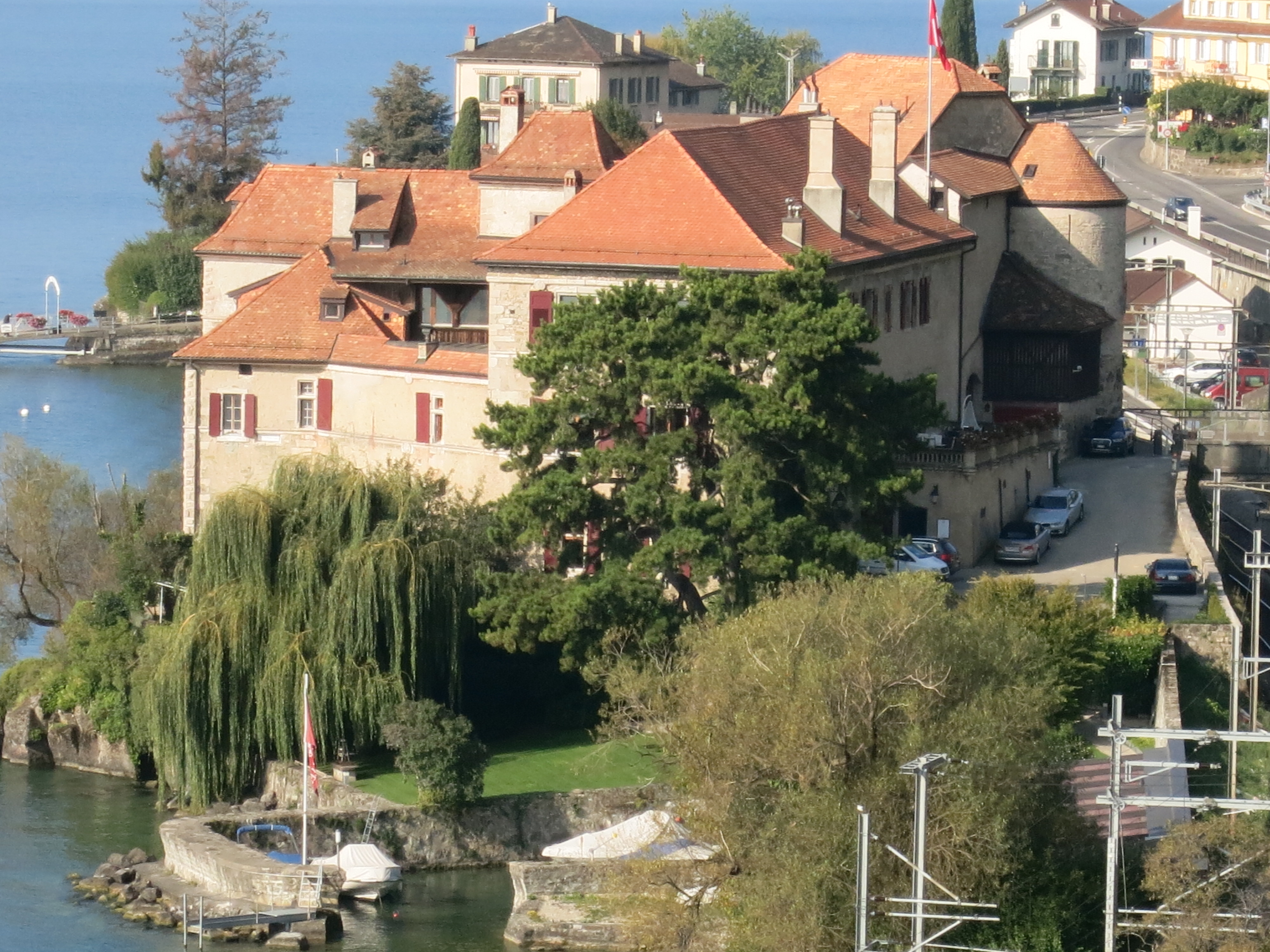 Château de Glérolles, St-Saphorin VD, Schweiz